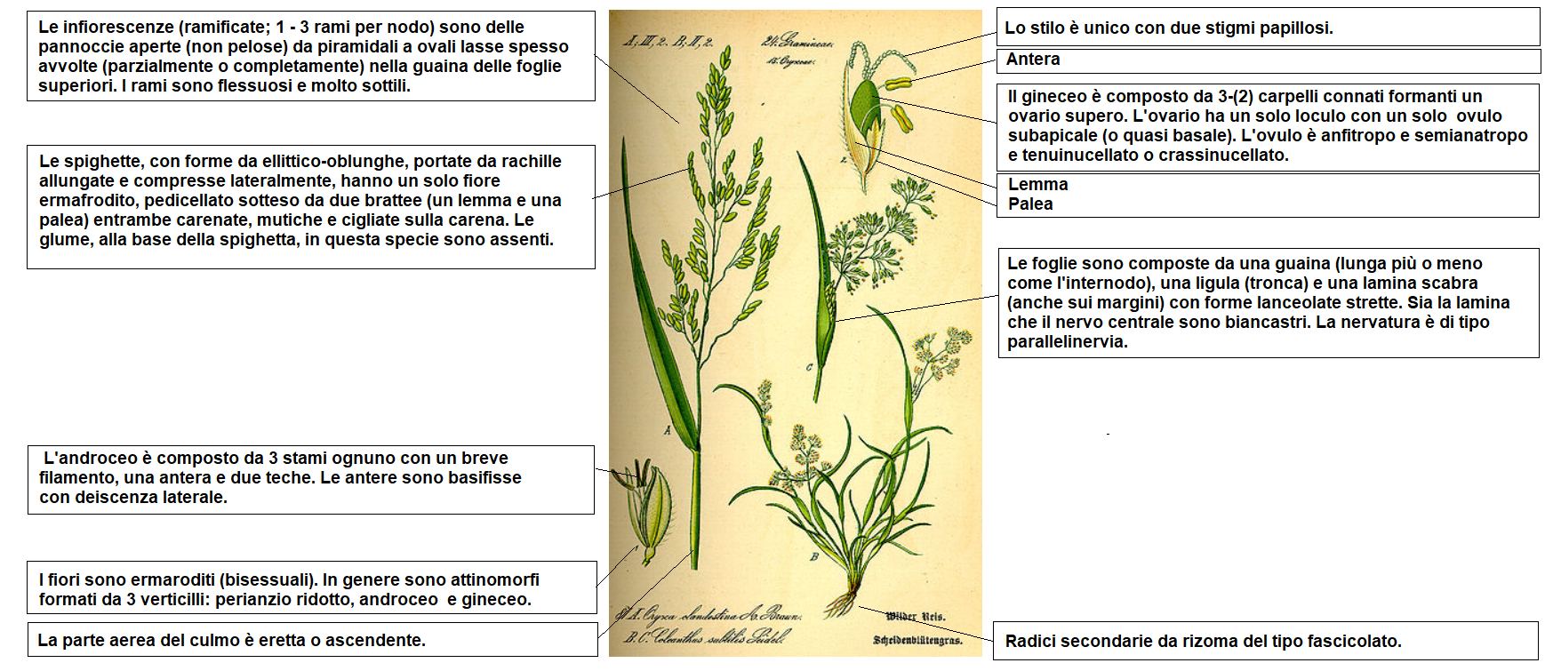 Coleanthus_subtilis